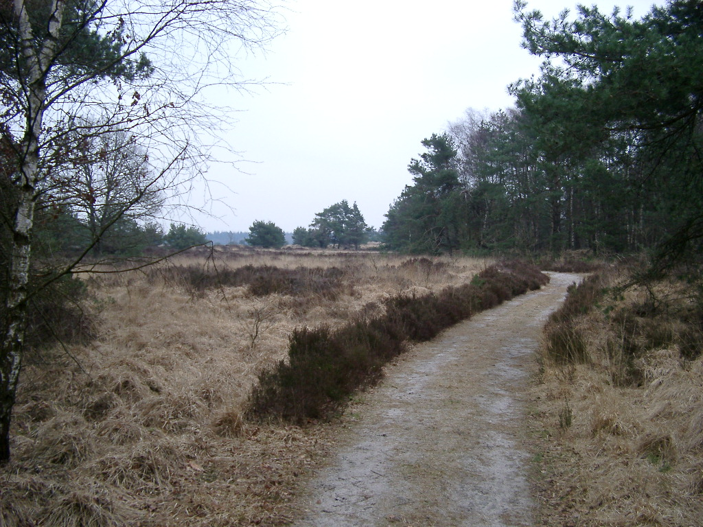 zelf gemaakte foto